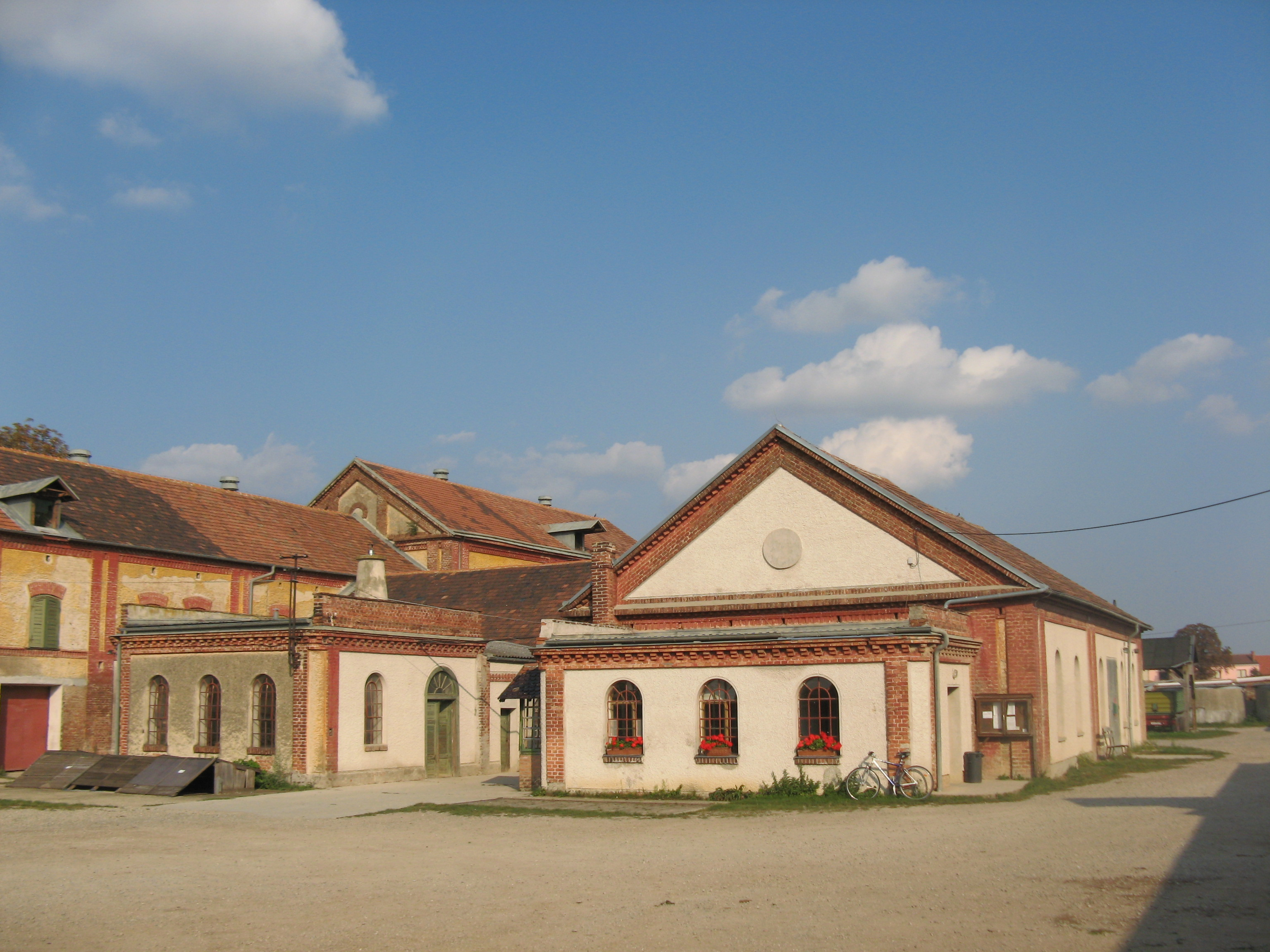 Haschahof (um 1900), Rosiwalgasse 41-43, Rothneusiedl, Wien-Favoriten